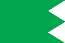 vlajka obce Lúky